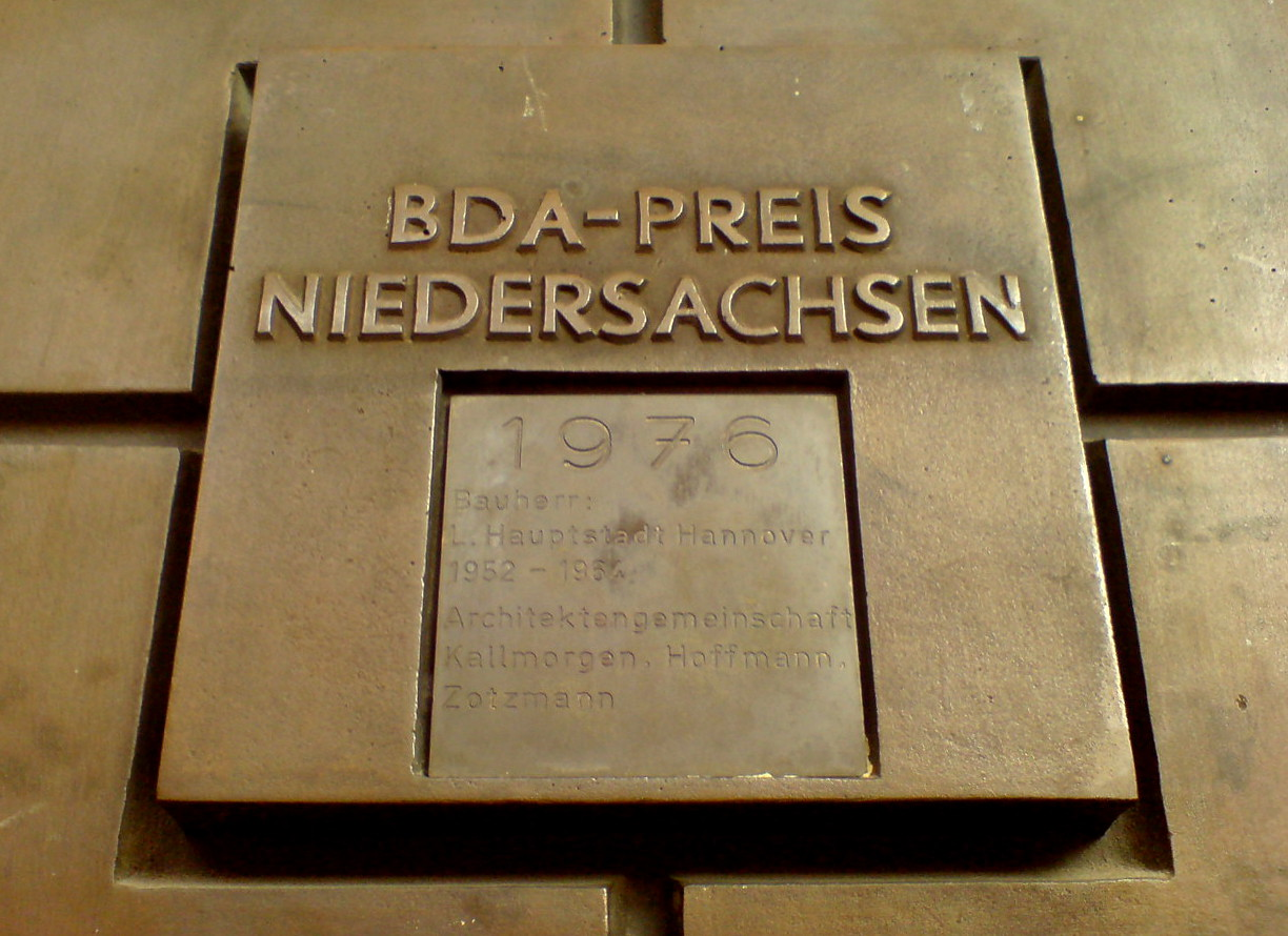 Der BDA-Preis Niedersachsen wurde 1976 für die Neugestaltung des Opernhauses in Hannover vergeben ...